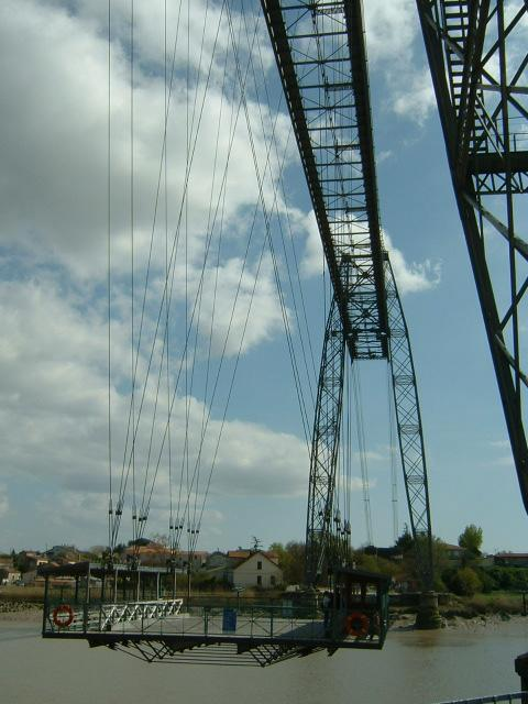 Pont Transbordeur de Rochefort - vue depuis la rive droite de la Charente, avec la nacelle arrivant.